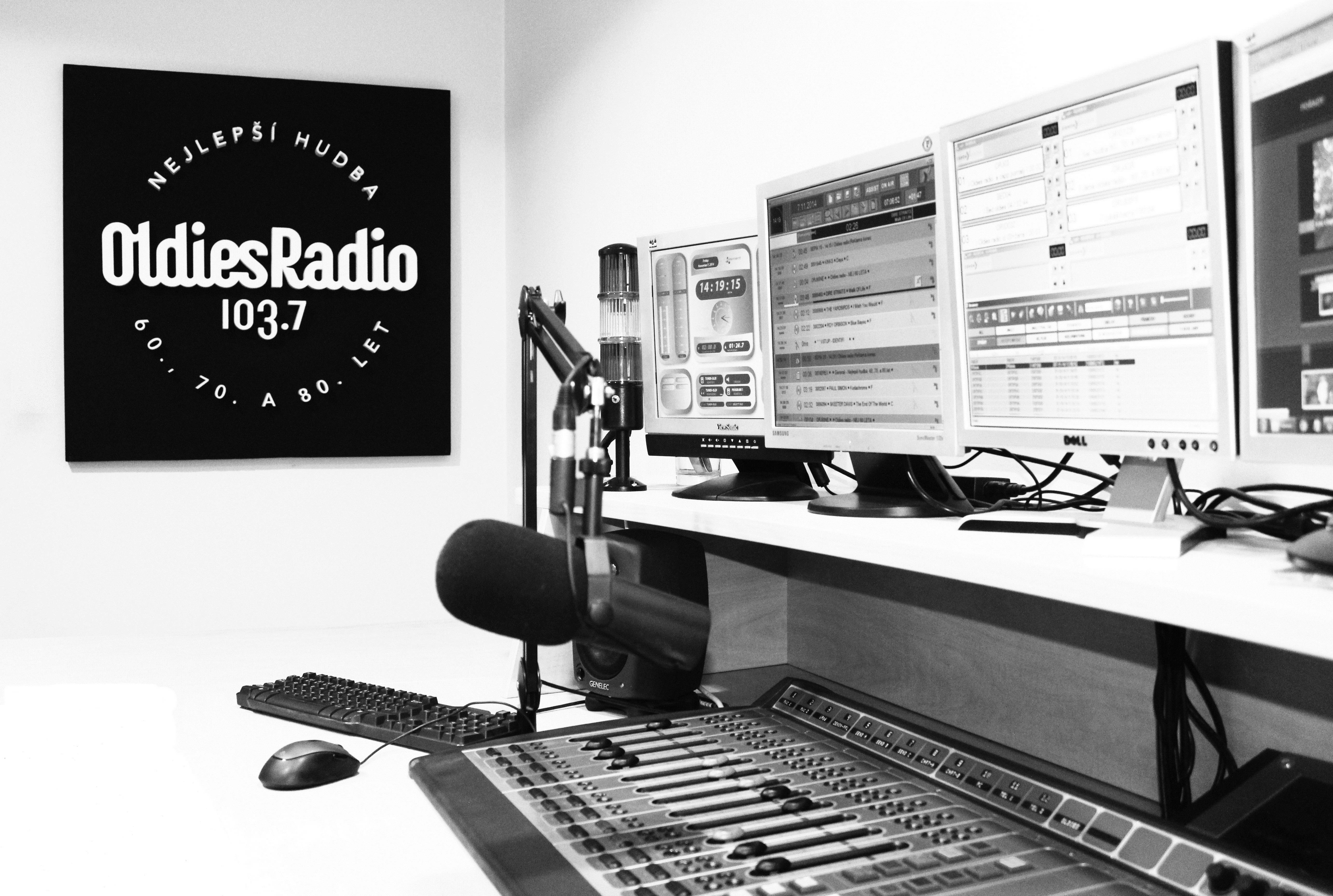 Oldies radio,vysílací studio